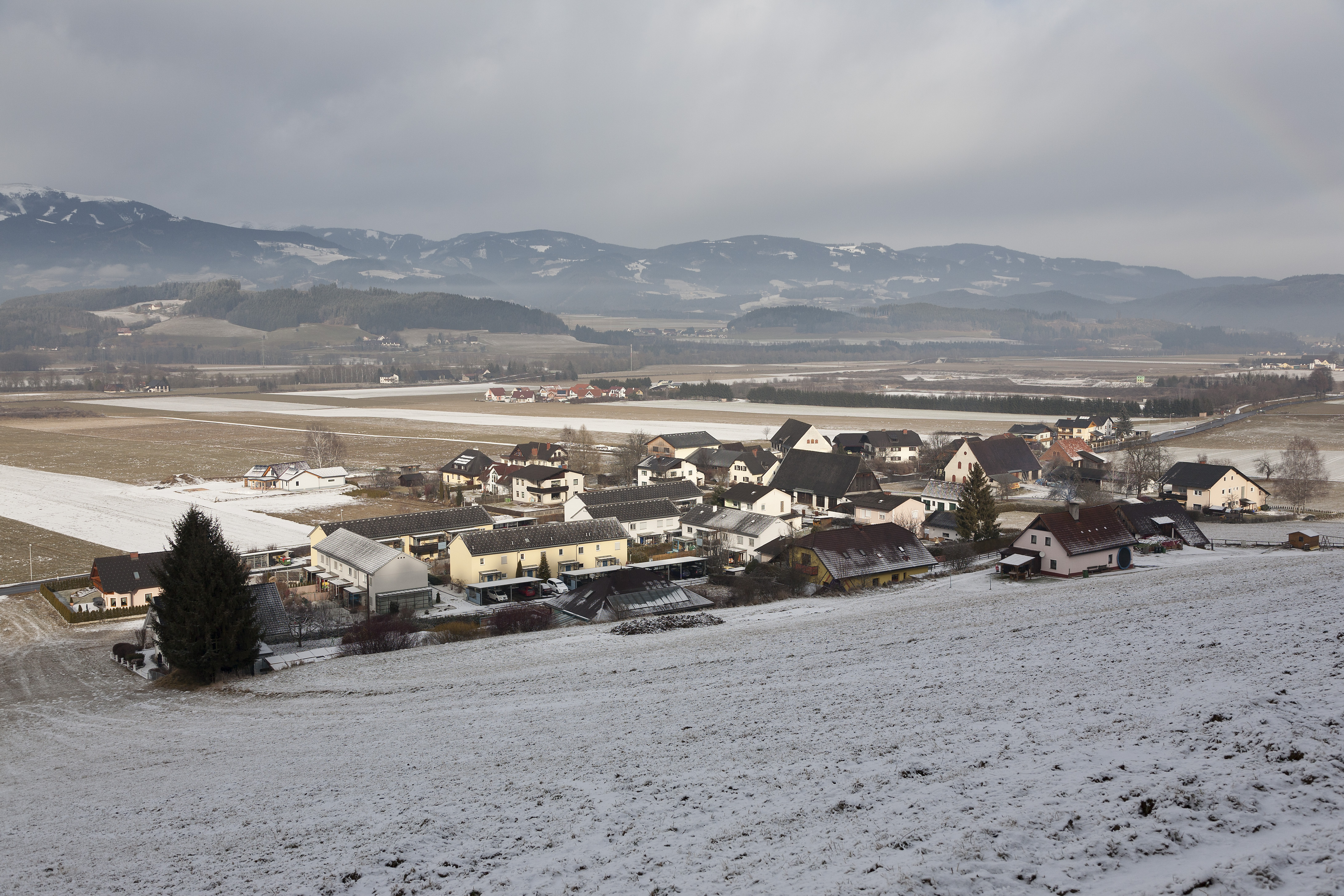 Blick auf den Ort Ugendorf